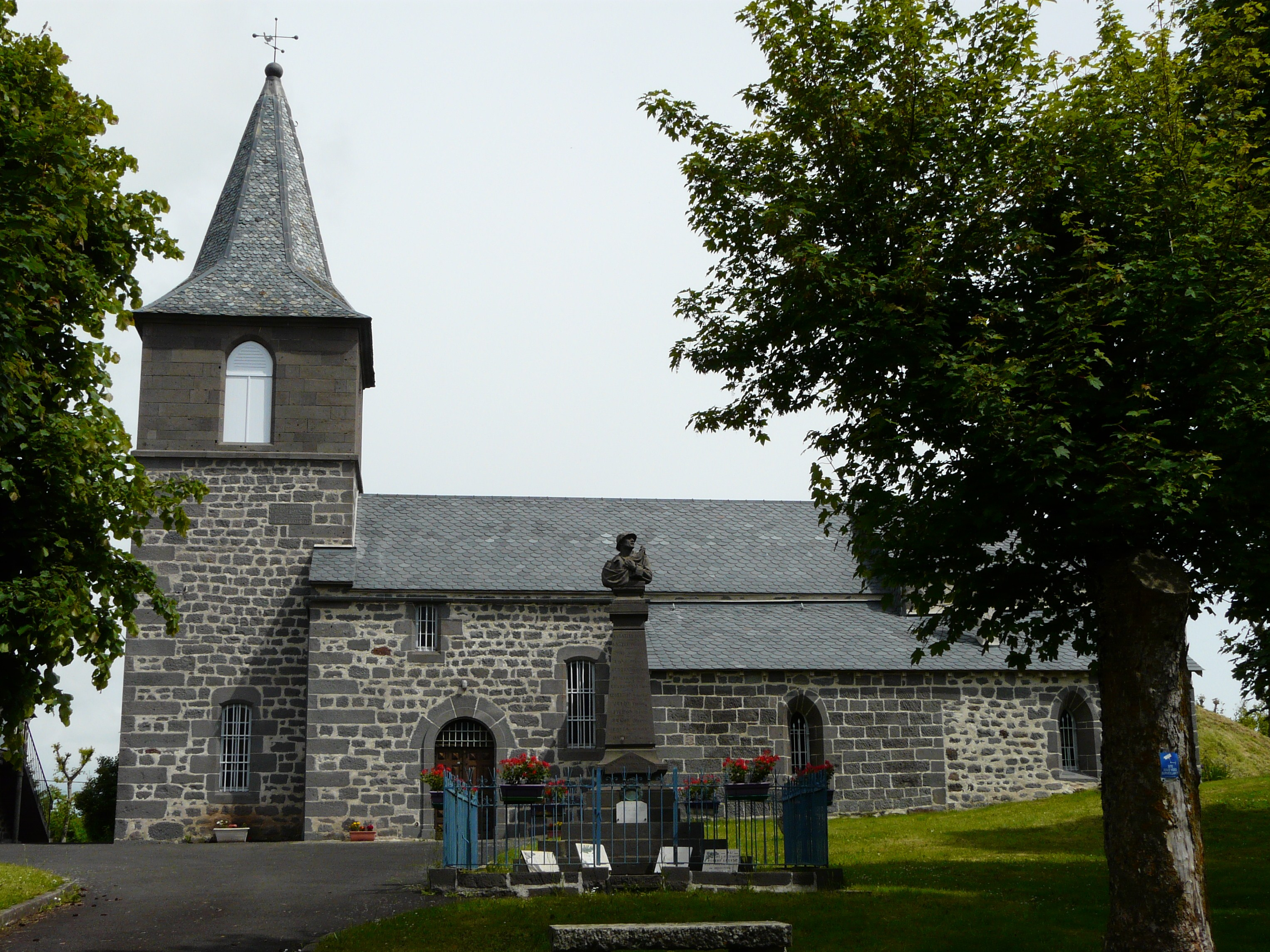 L'église de Tanavelle, Cantal, France.